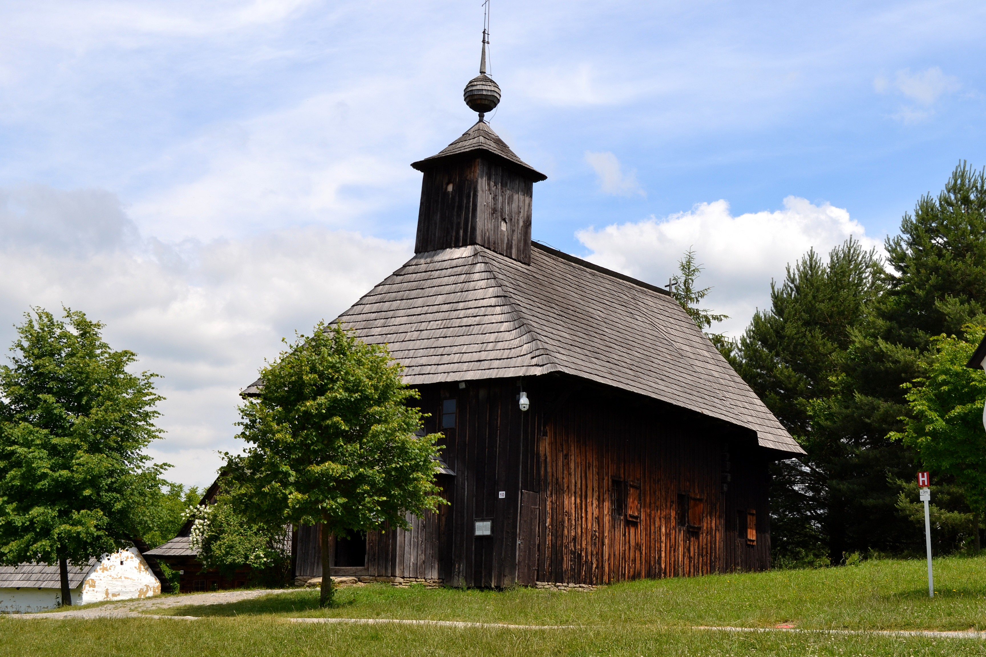 Kostol svätého Štefana Kráľa z Rudna (okr. Turčianske Teplice); celkový pohľad